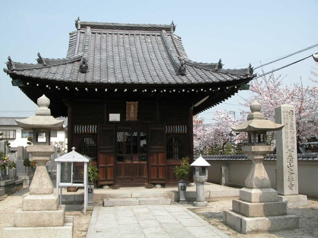 東禅寺本堂